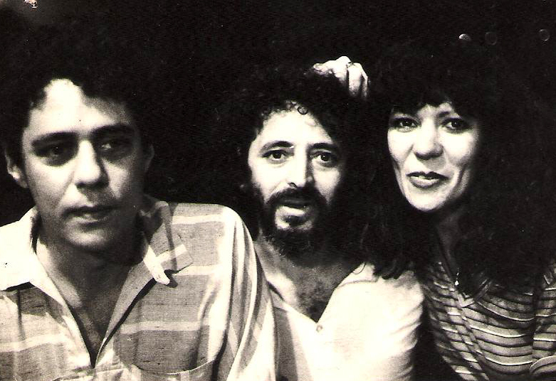 Chico Buarque, Geraldo Azevedo e Elba Ramalho no projeto Kalunga